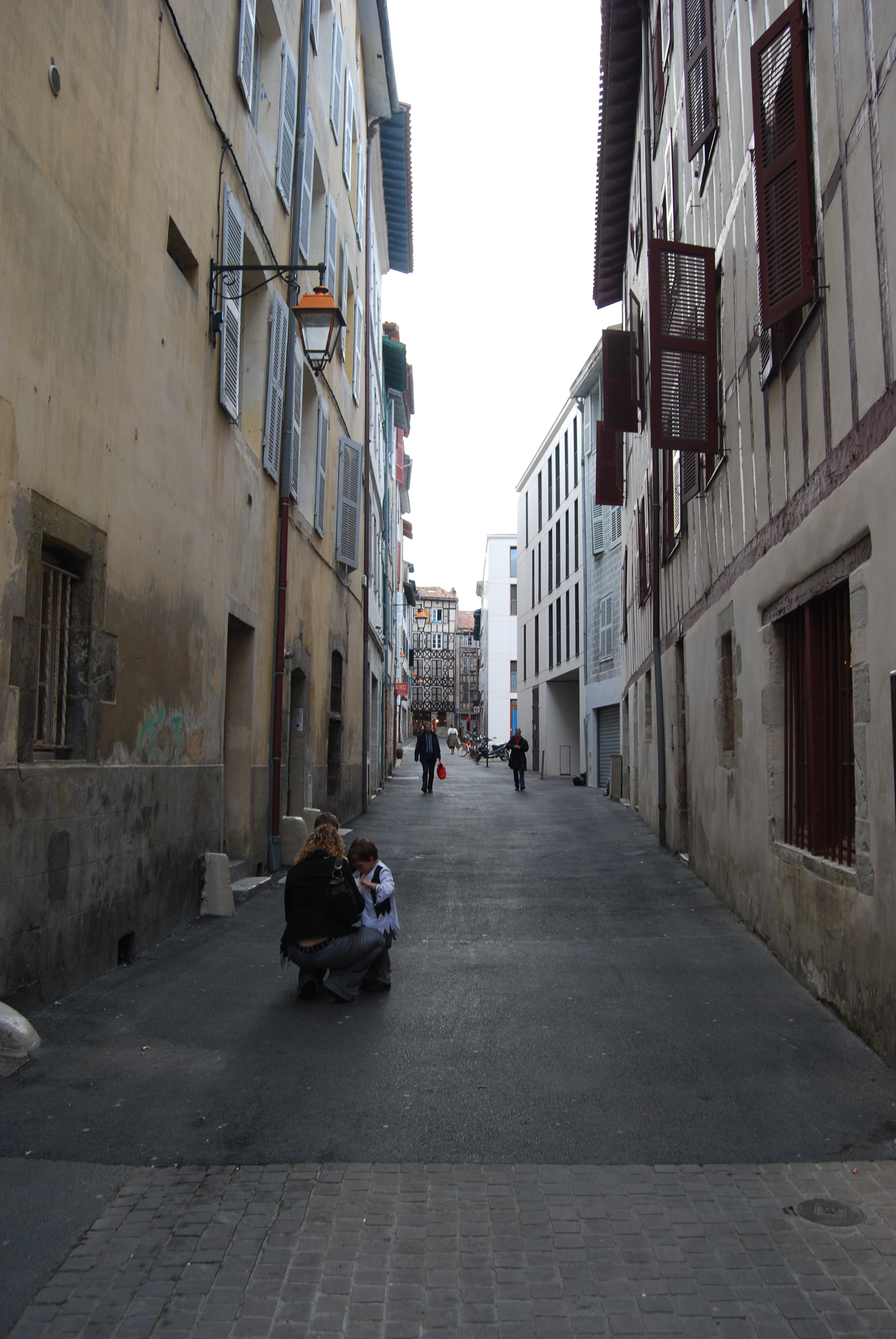 La rue Vieille-Boucherie.